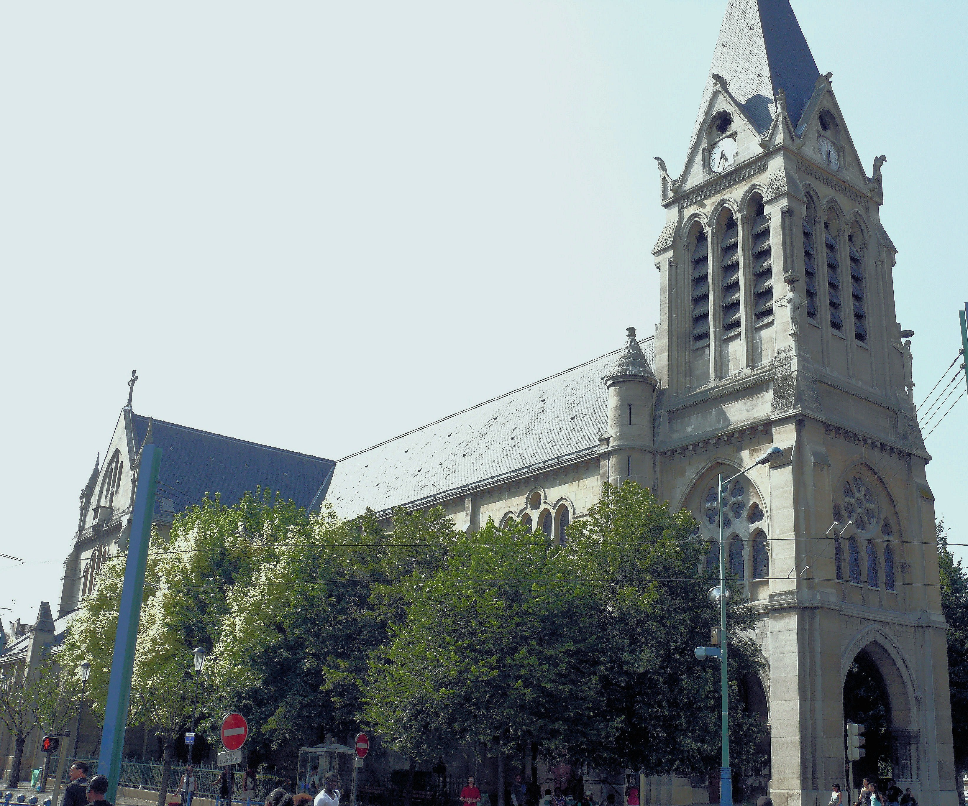 Saint-Denis - Eglise Saint-Denis-de-l'Estrée